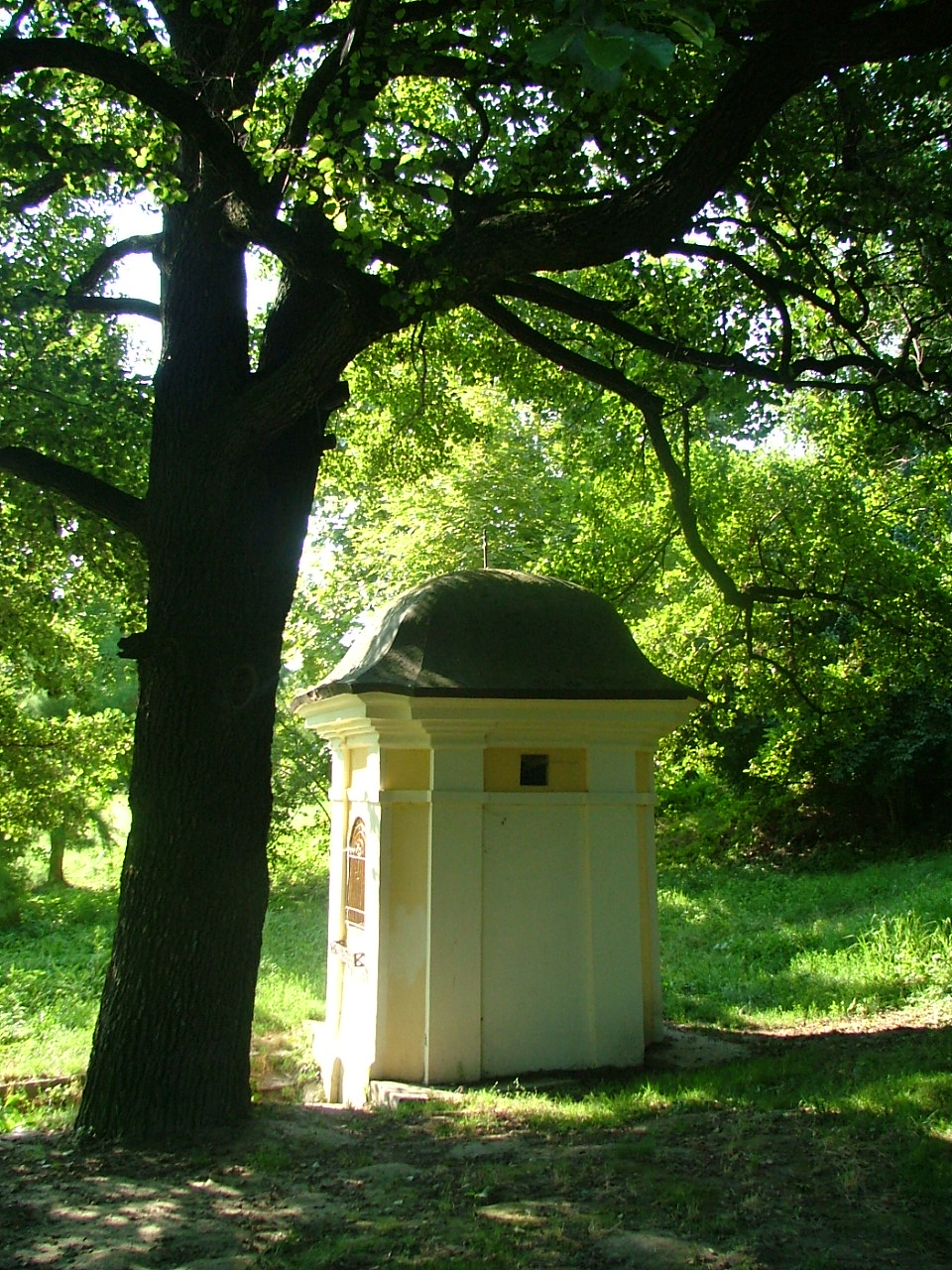 Béla-kút (Ravazd, Magyarország)